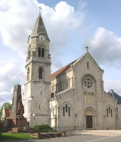 Église de Danjoutin (Territoire de Belfort) Photo prise le 7 mai 2004 par LP90